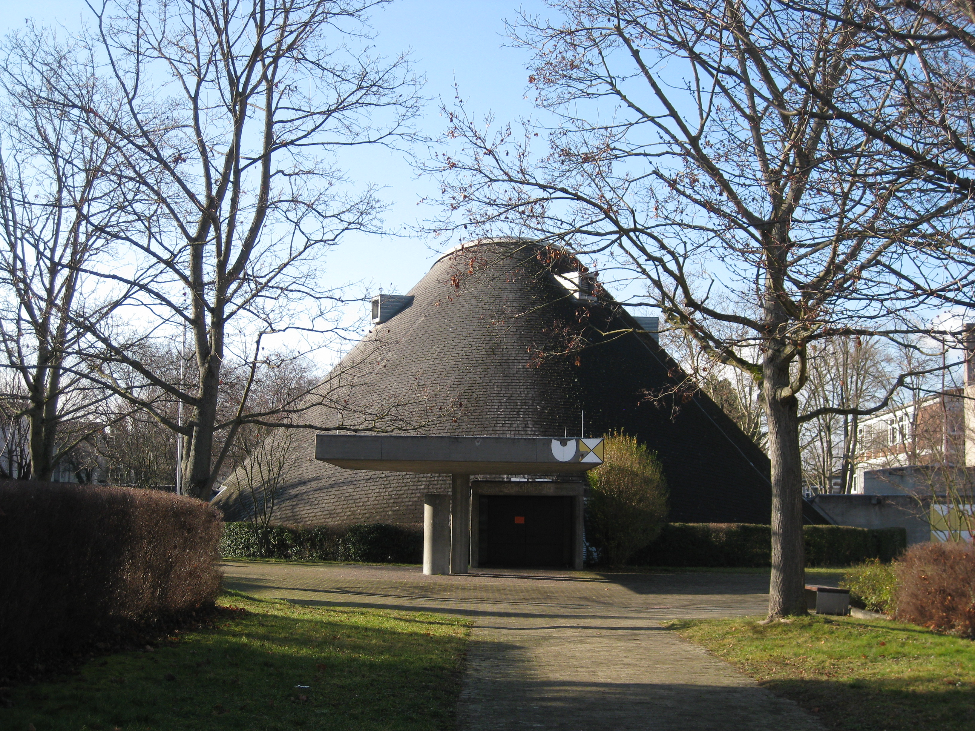 Maria Regina ist eine römisch-katholische Kirche in Fellbach.